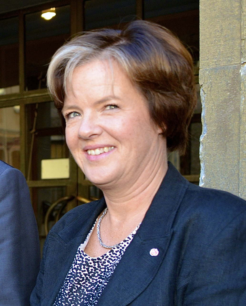 Carin Jämtin på Brantingtorget vid Kanslihusannexet i Gamla stan i Stockholm den 15 september 2014.